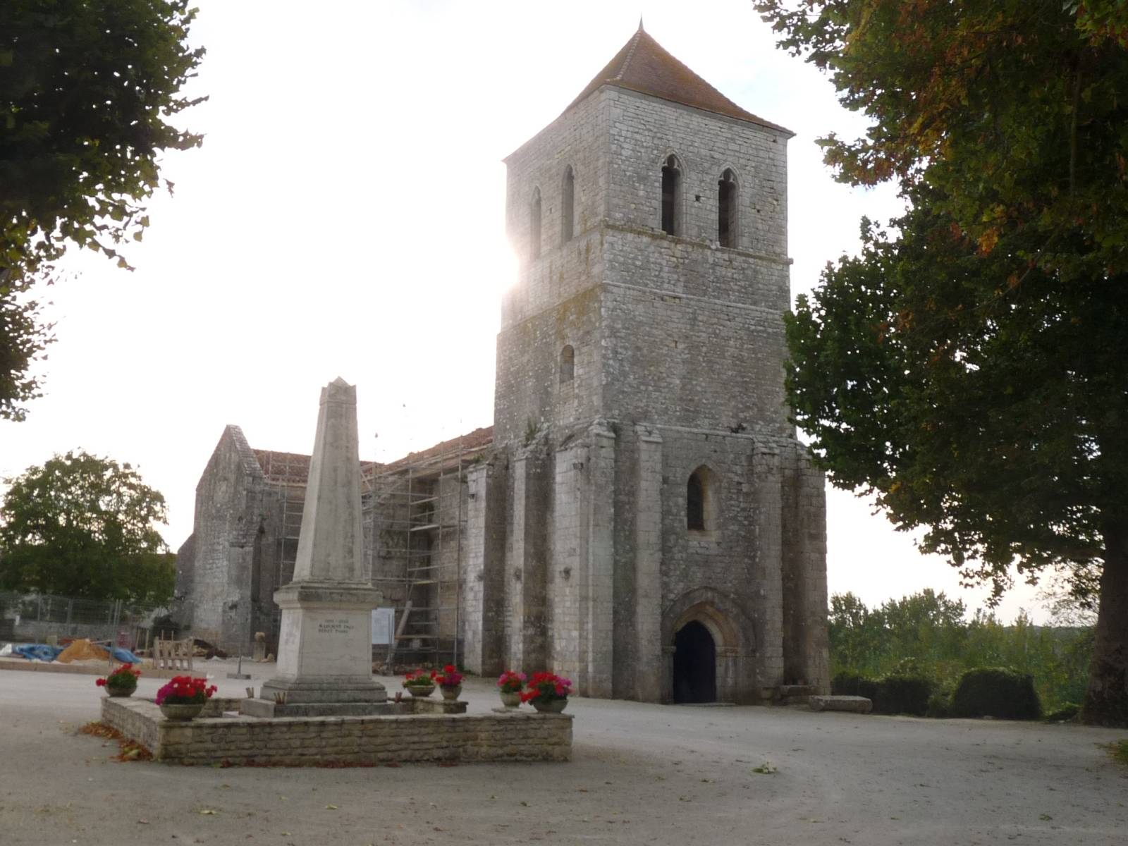 l'église et le monument aux morts de St-Front, Charente, France